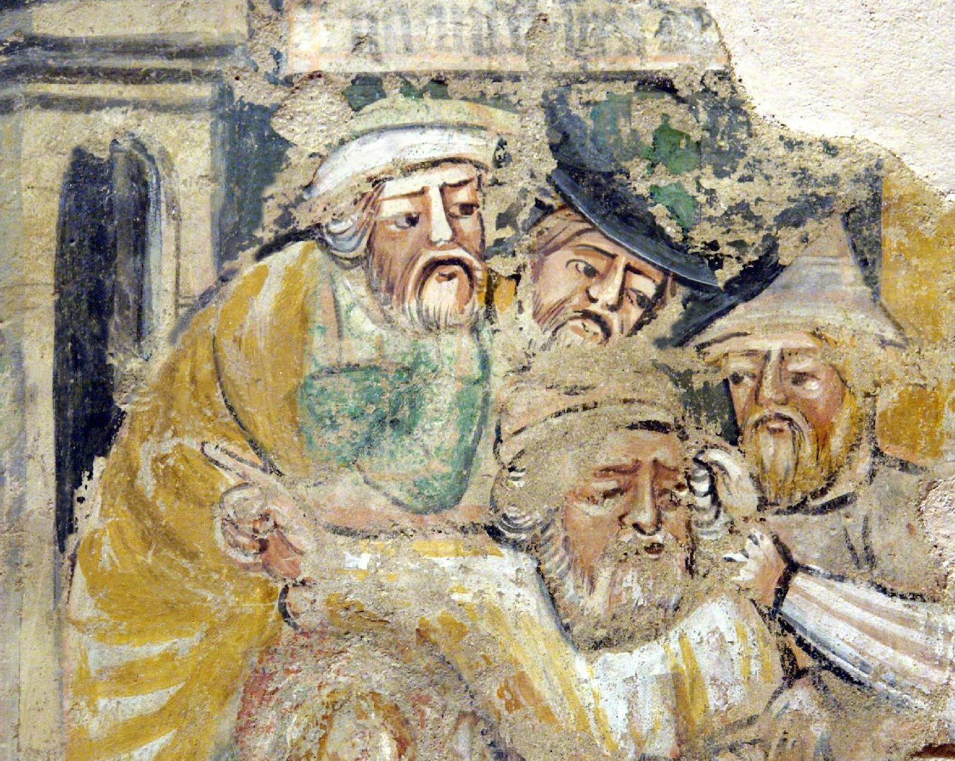 Toronyhely, Zsuzsanna és a vének - freskórészlet